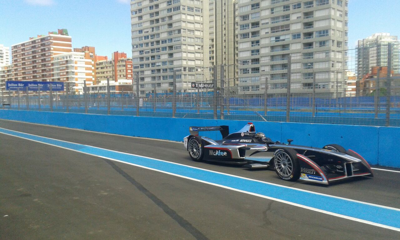 aaaaa